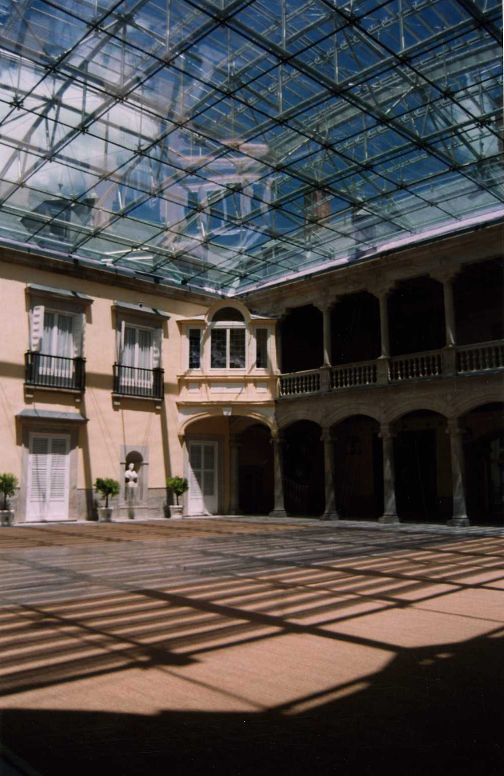 Vista interior de uno de los patios de los Reales Sitios del Pardo. Cubierta ligera